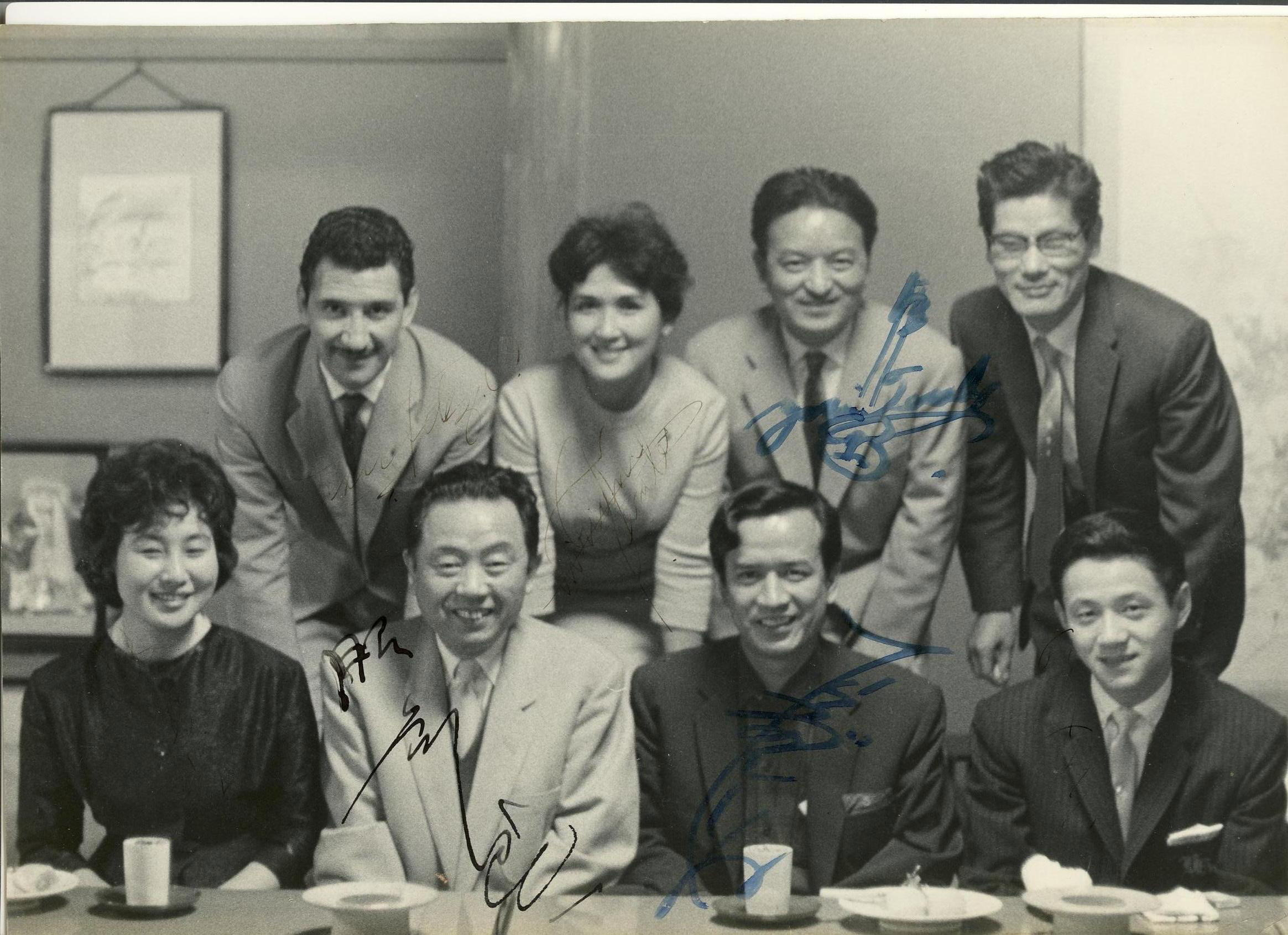 服部良一らとの記念撮影